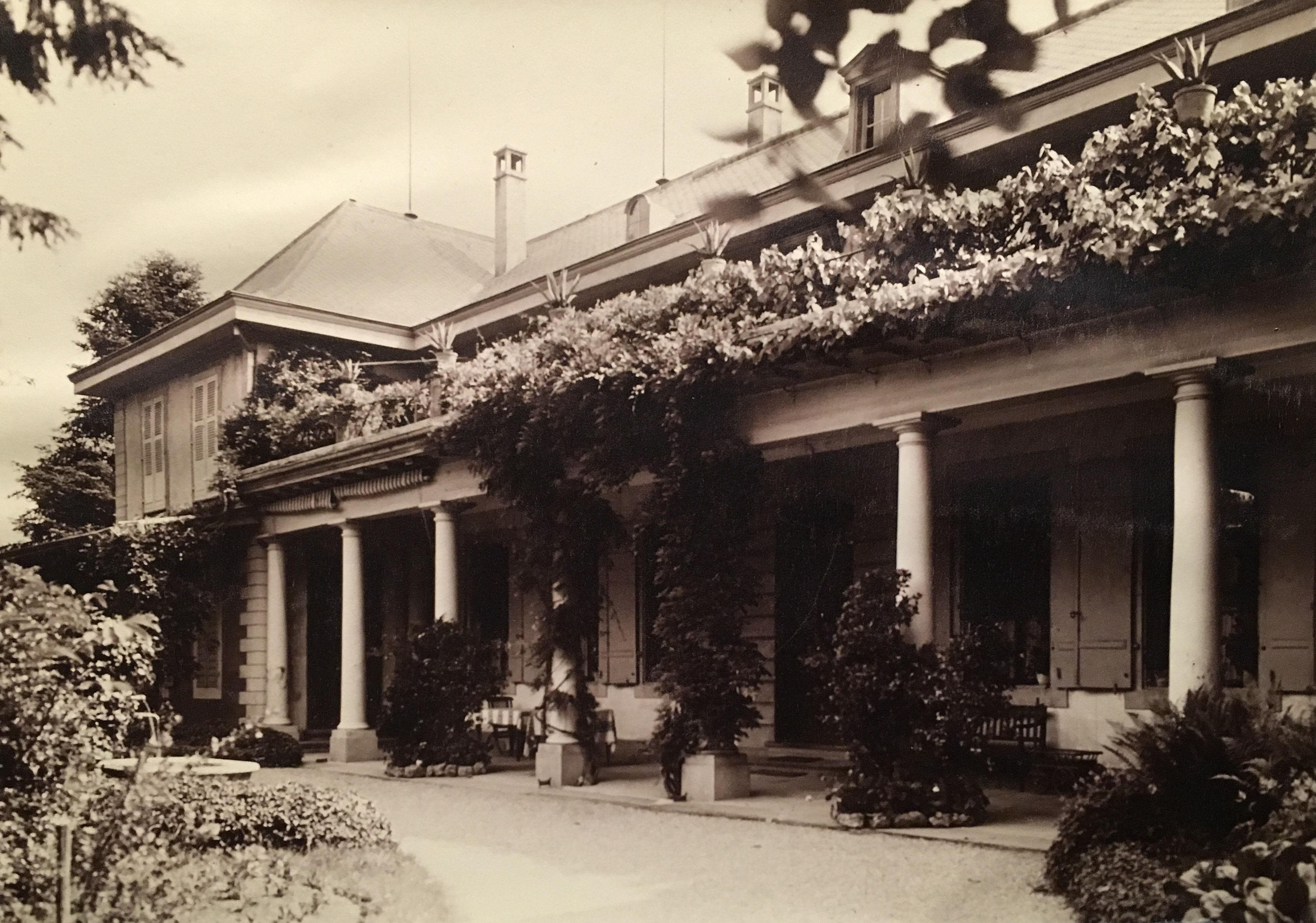 Albert Stumpf, Campagne Diemerswil, Peristyle